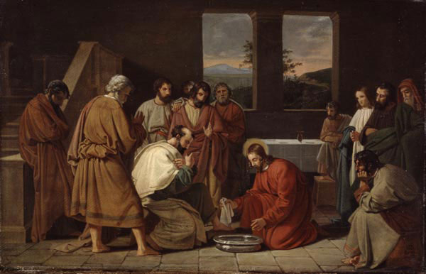 Ölskizze zu dem Altargemälde, das Detlev Conrad Blunck für die von C. F. Hansen erbaute klassizistische Vicelin-Kirche zu Neumünster malte.